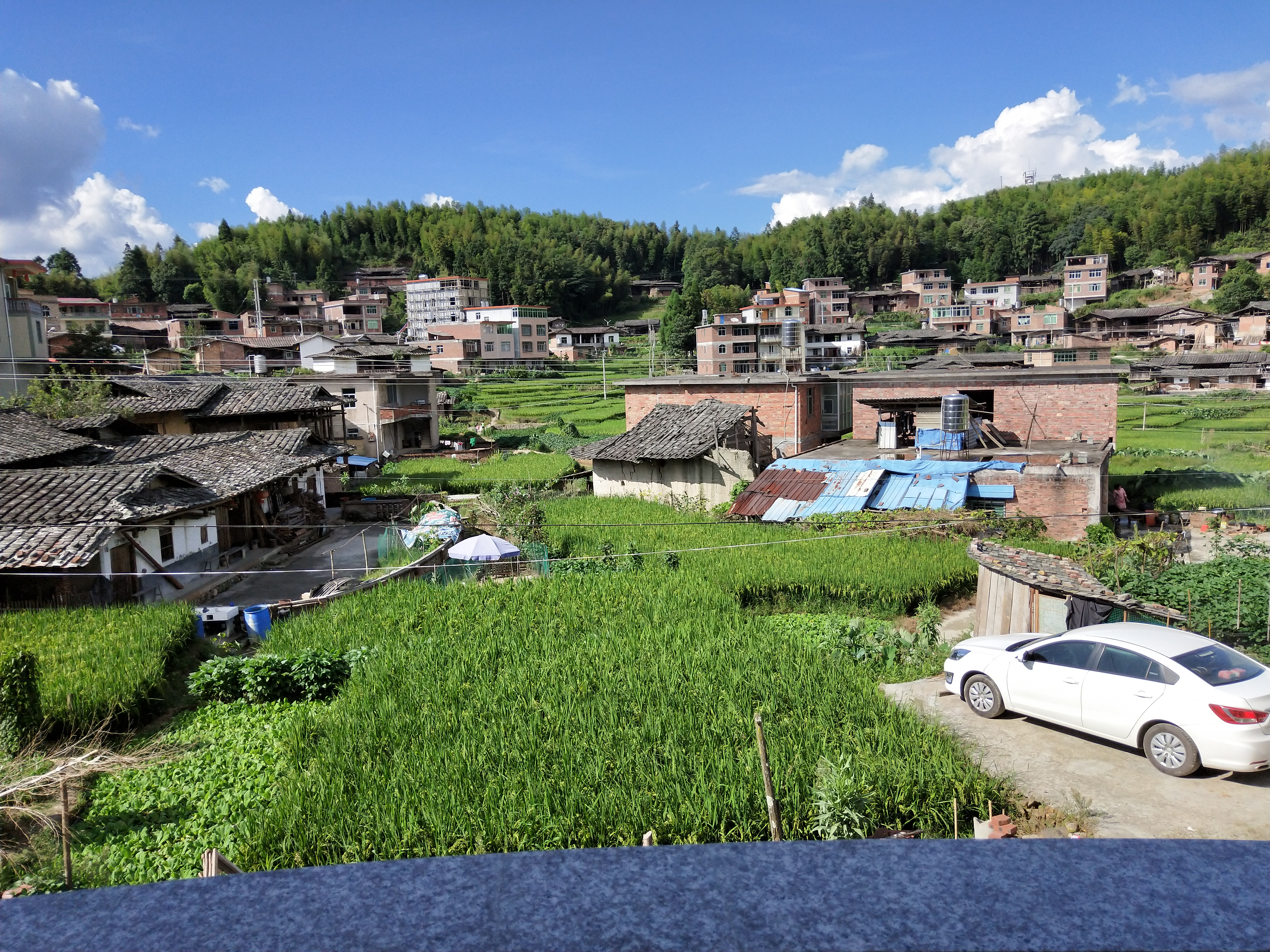 中文（中国大陆）: 横口乡福联村